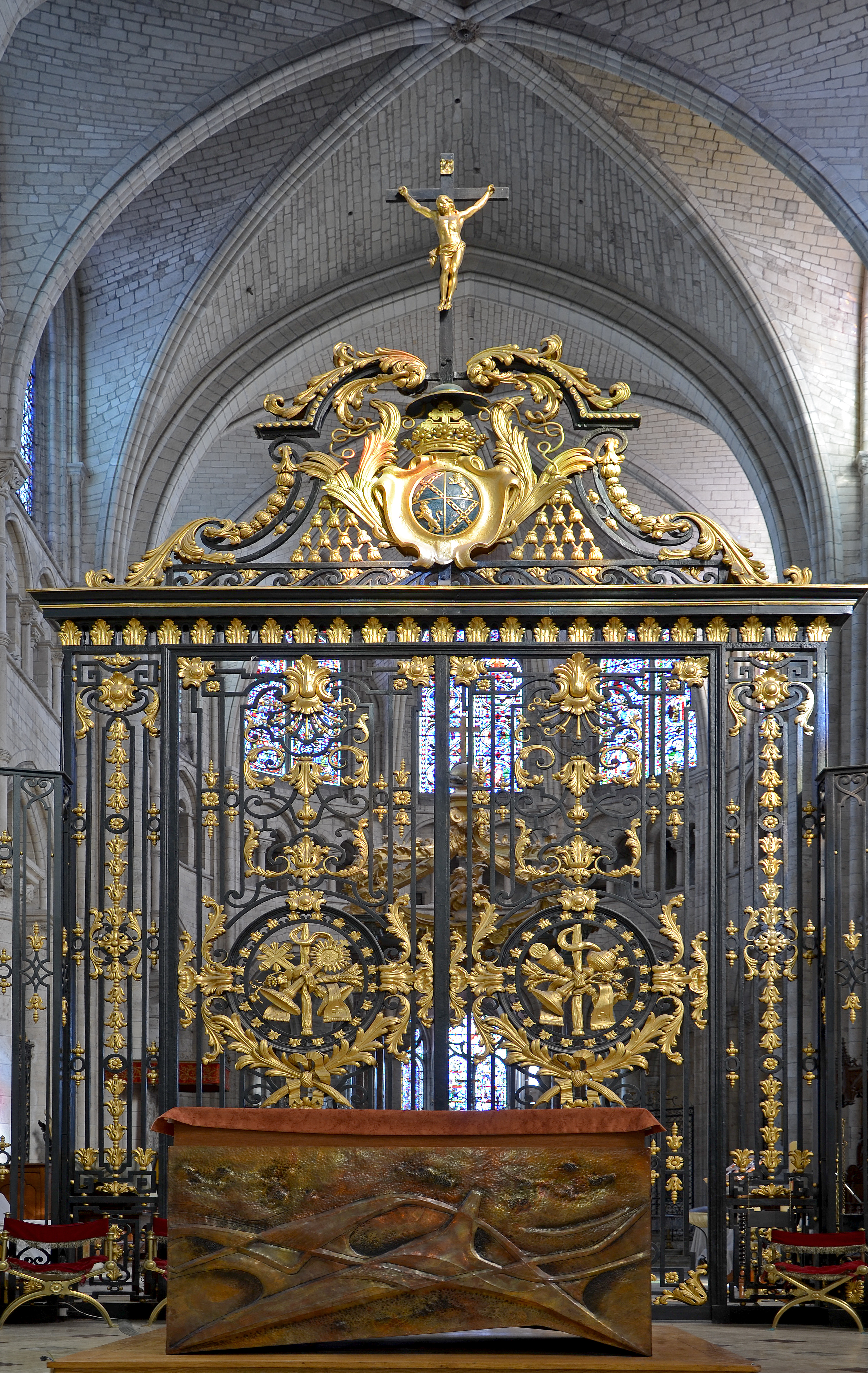 Grilles du chœur de la cathédrale de Sens, Yonne, Bourgogne, France